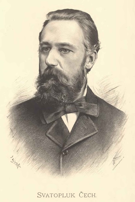 Portréty předních osobností od Jana Vilímka